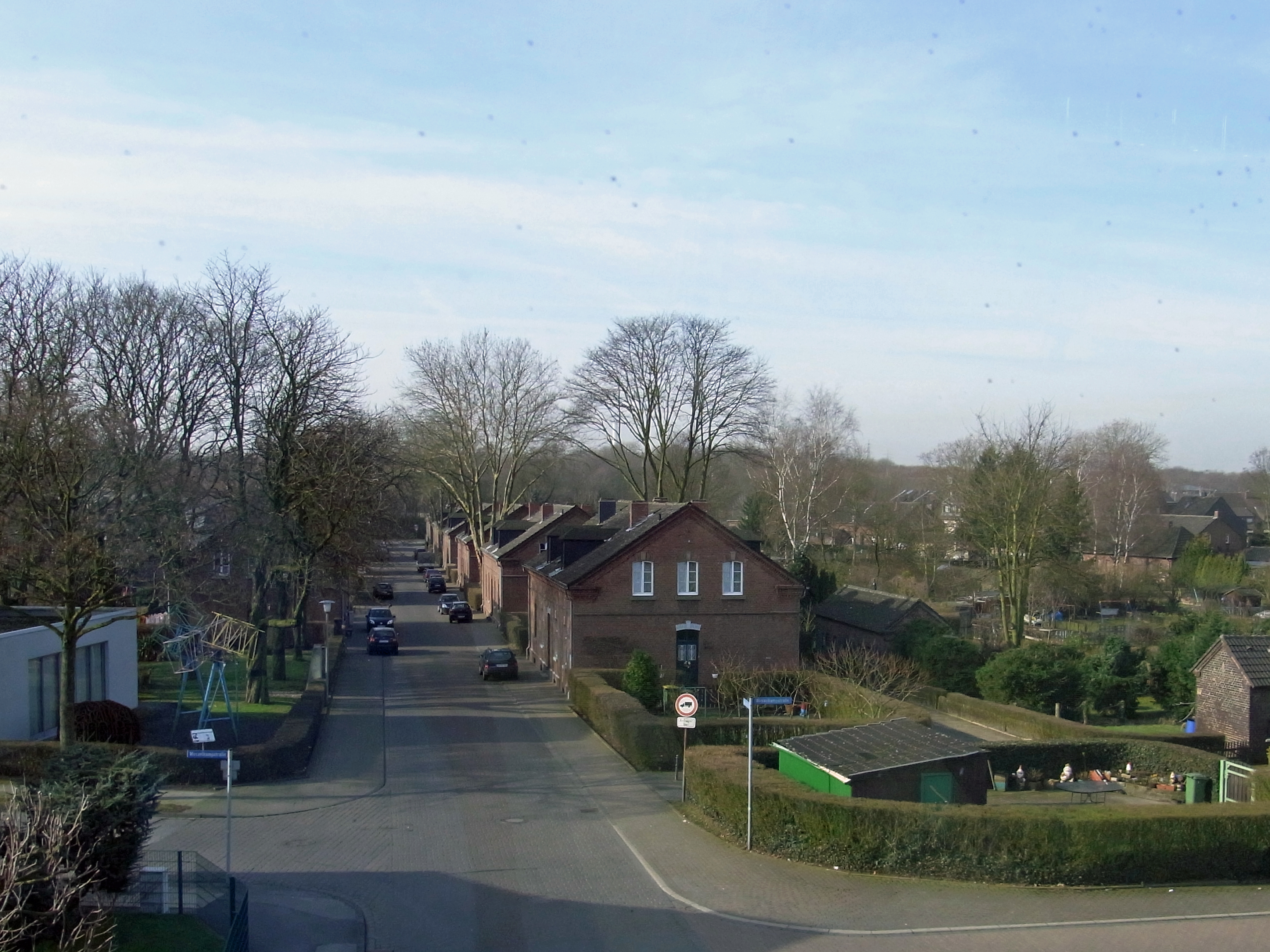 Siedlung Eisenheim